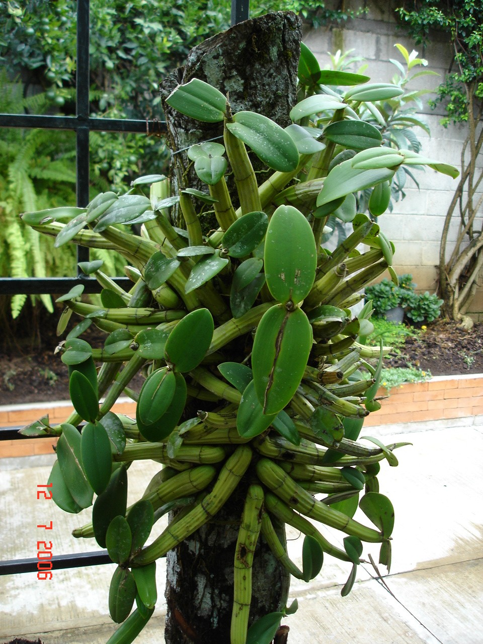 Planta de Myrmecophilia sin florecer.